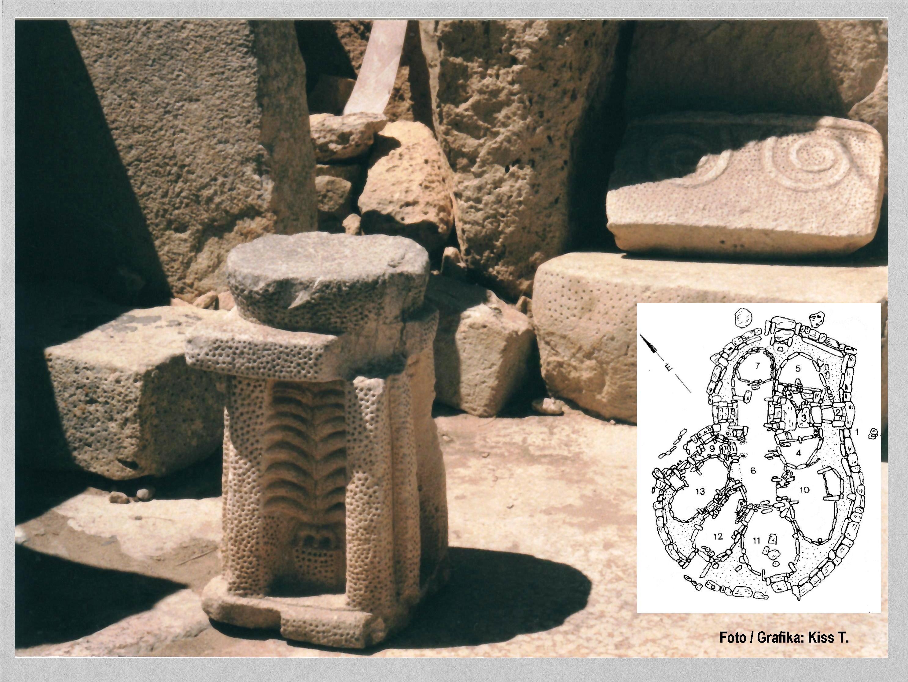 Hagar Qim: Megalit templom (Málta)